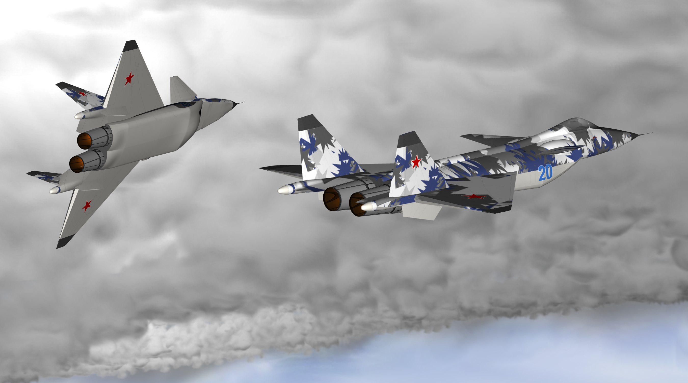 Mikoyan Project 1.44